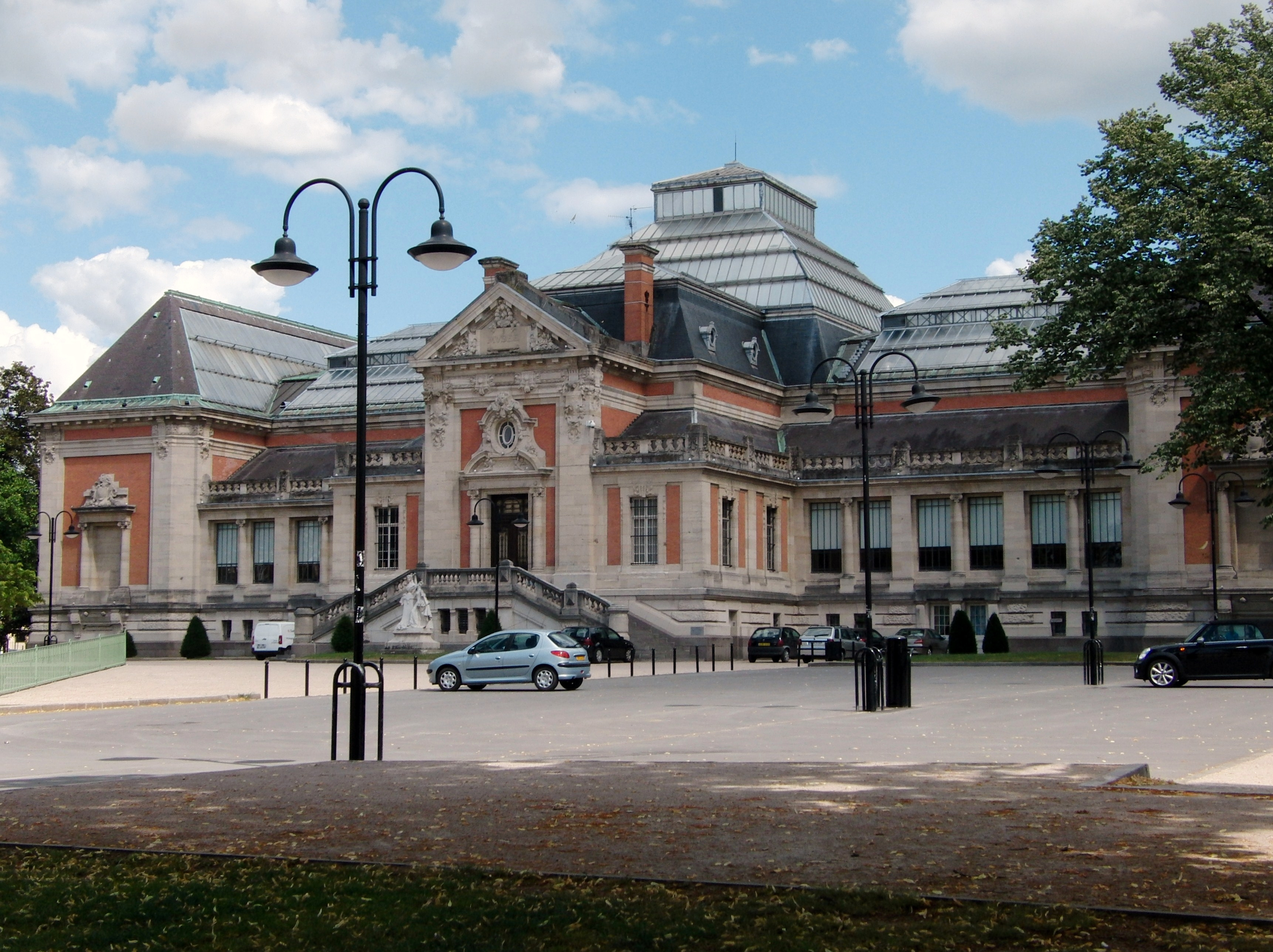 Valenciennes le musée des Beaux-Arts. Nord (département français).